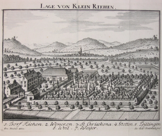 "Lage von Klein Riehen" (Landgut Bäumlihof bei Riehen, nördlich von Basel, Schweiz. Erschienen in Topographie der Eydgenoßschaft von David Herrliberger, 1752)